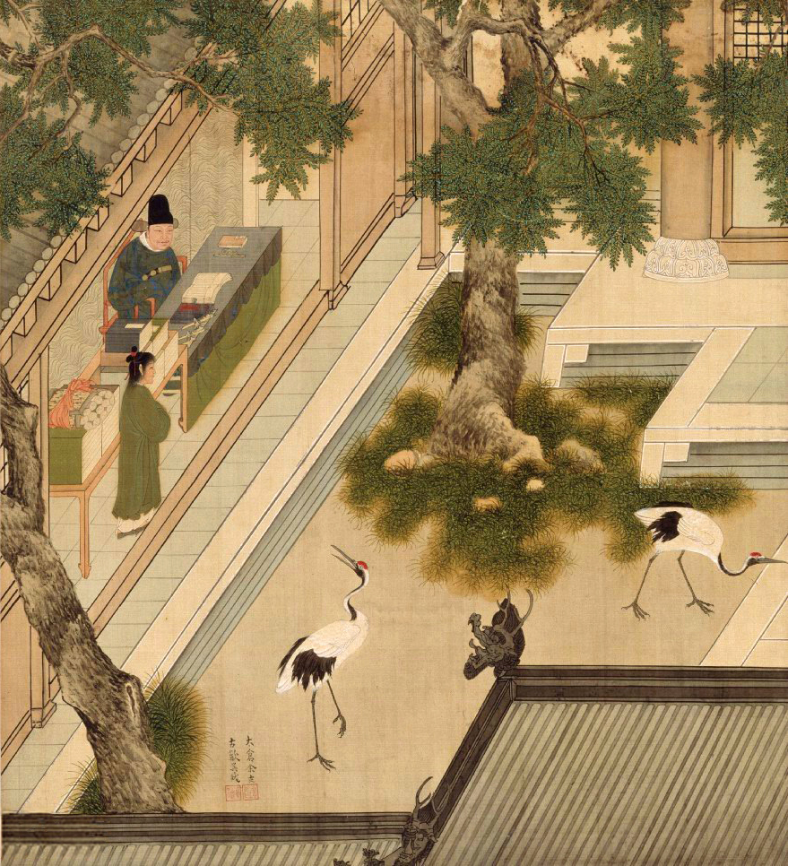 中秘讀書，時年三十三